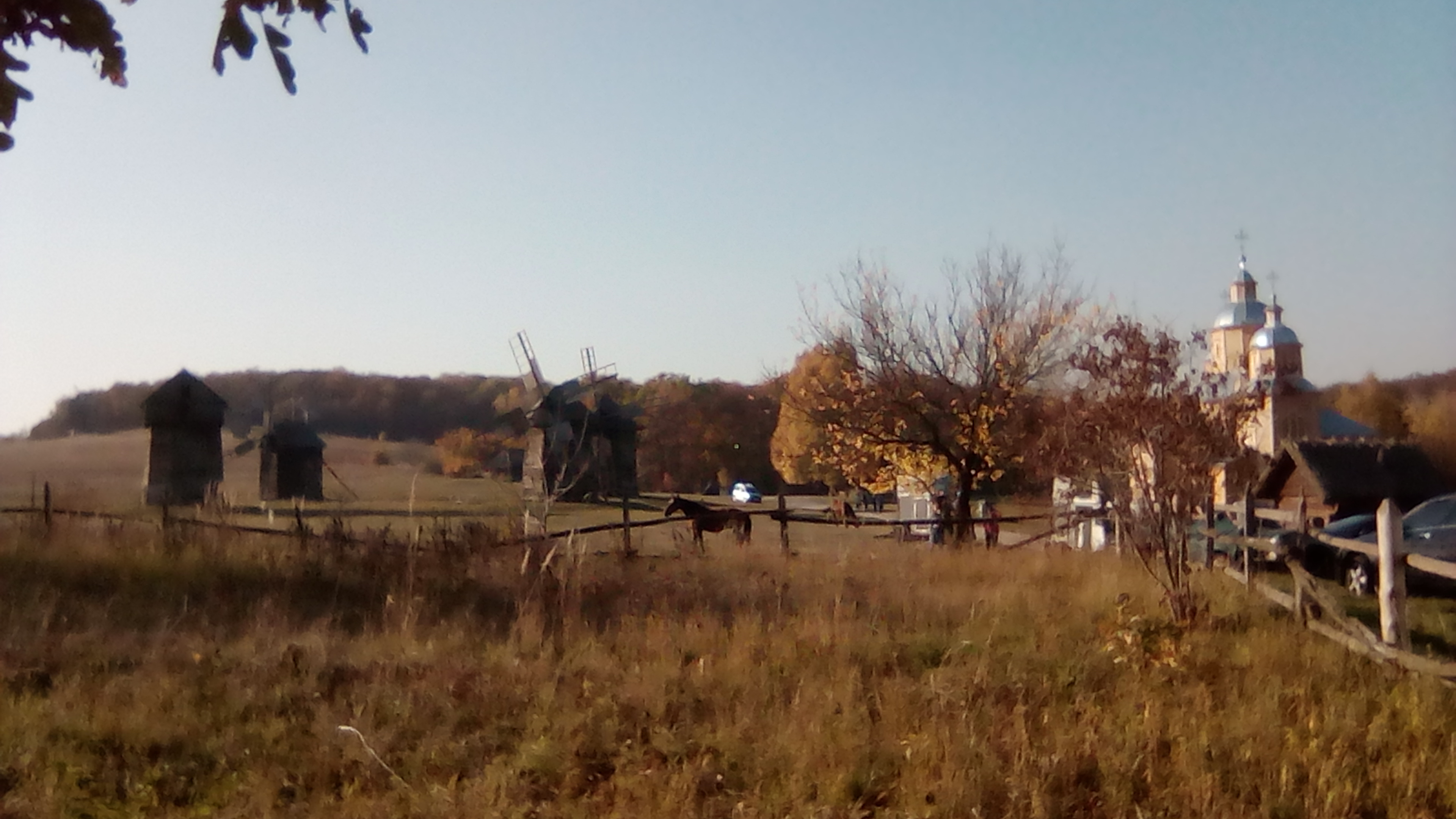 Съёмки